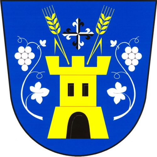 znak, Tvořihráz, okres Znojmo